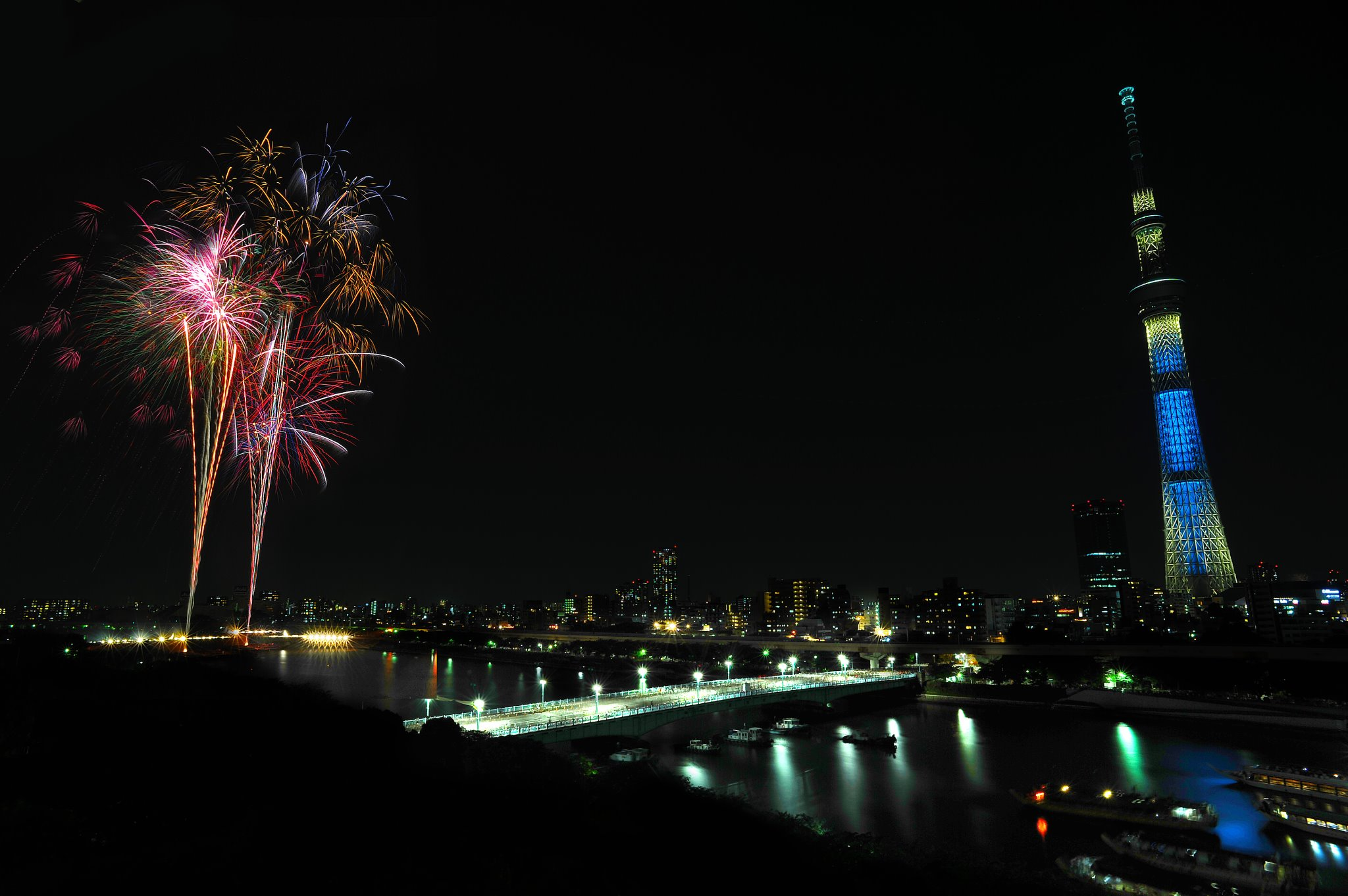 スカイツリー開業後初となる隅田川花火大会の様子。